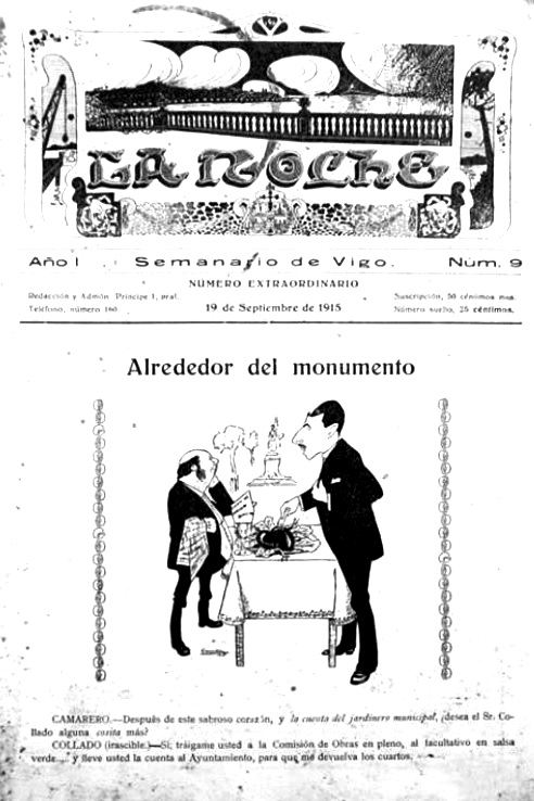 La noche. Semanario de Vigo, número 9